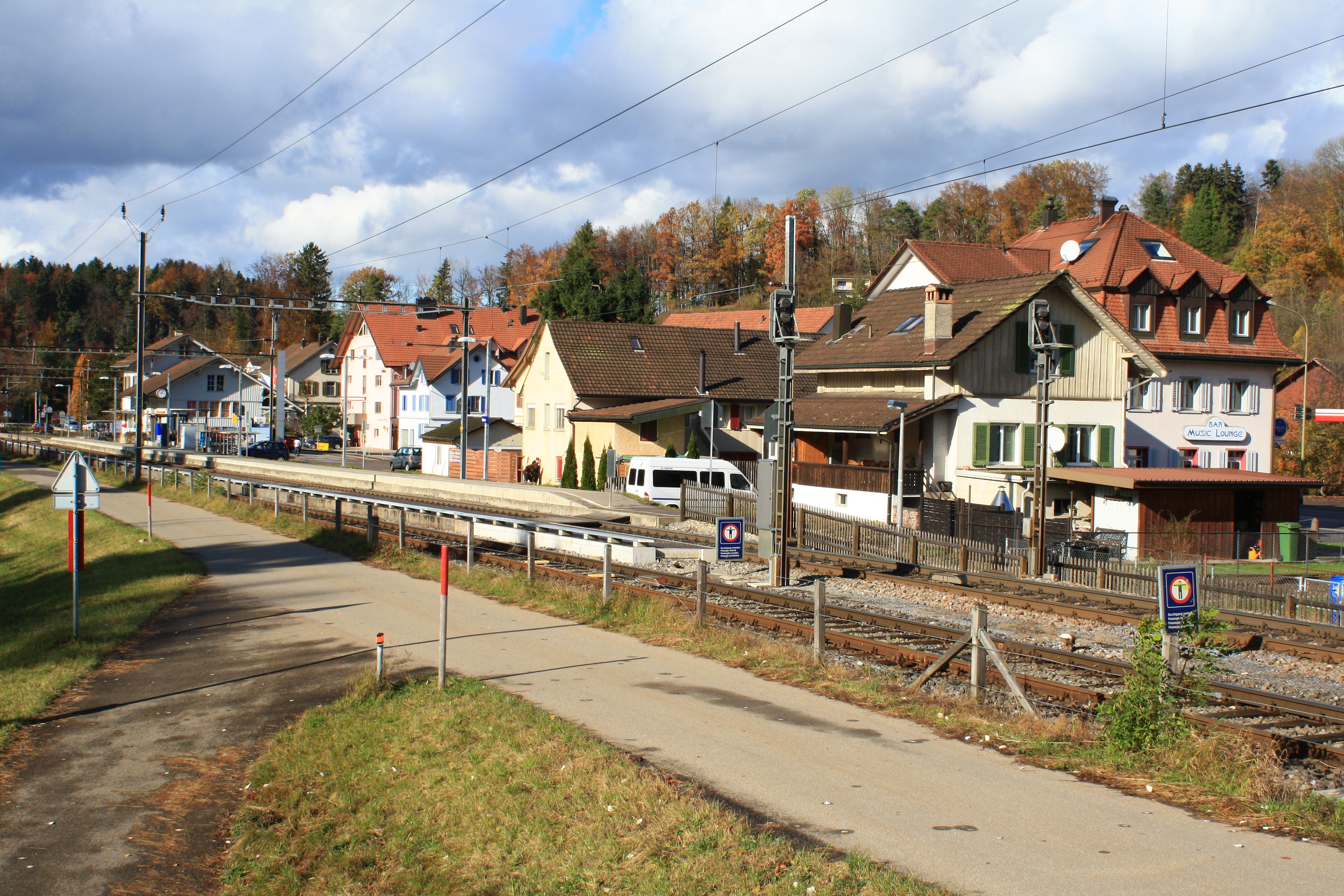 Rikon in the Töss Valley (Tösstal) in Switzerland